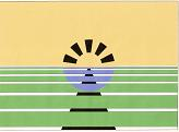 Bandera oficial creada con motivo del Centenario de Sacanta